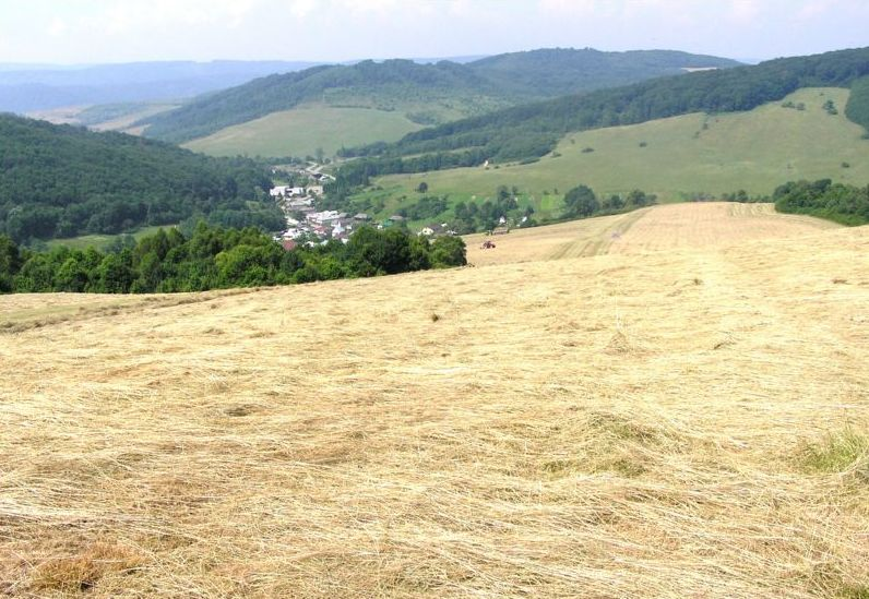 Celkový pohľad na obec Tokajík